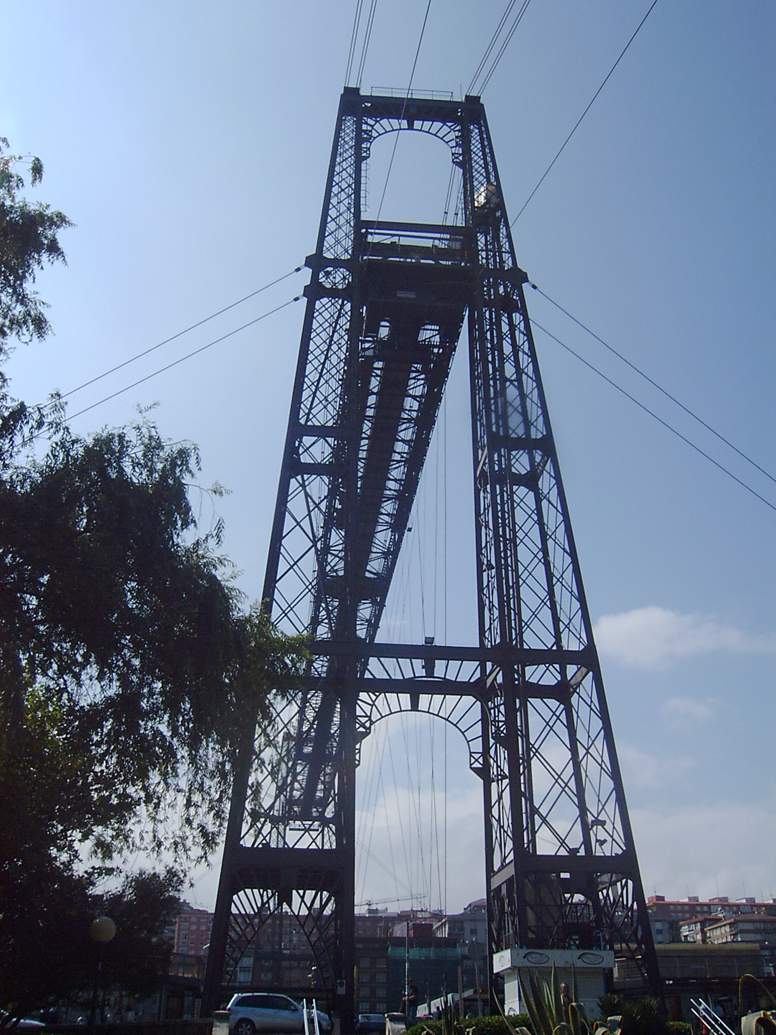 Bizkaiko zubia Areetatik